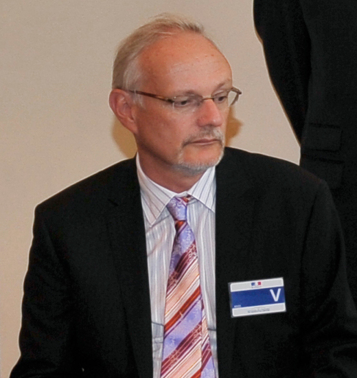 Jean-Michel Severino